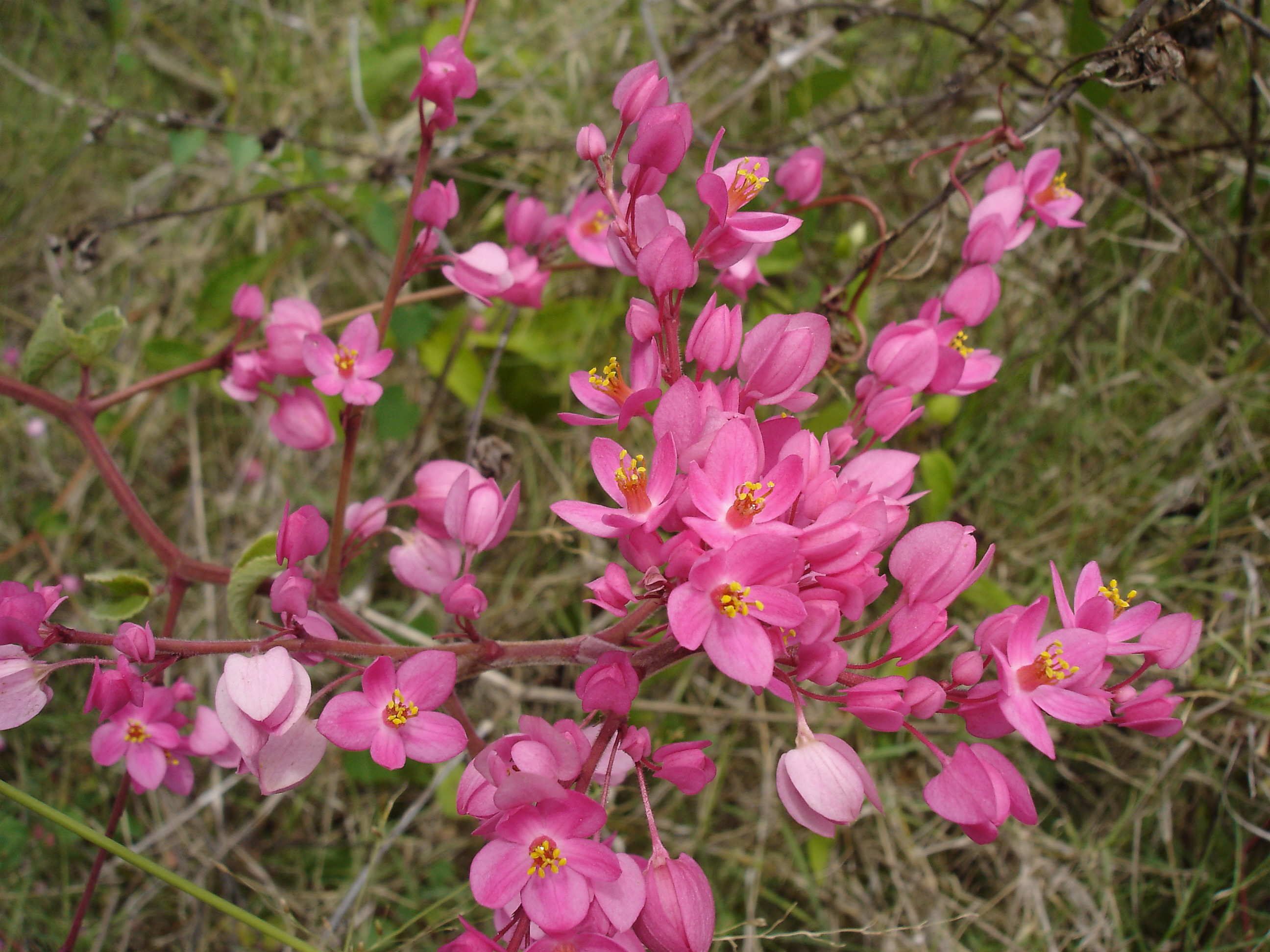 Description: Antigonon leptopus (Polygonaceae), "Liane corail" Plante herbacéee à feuilles simples à disposition alterne, sommet apiculé à base cordéee. Vrille à l'aisselle de la feuille. Inflorescence axillaire en grappe. Les bractées en rose et les fleur à l'intérieur , Abdoulaye kane Dia Licence Sciences Naturelles UCAD 2011